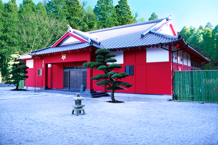 弥勒菩薩光臨堂（ラエリアン・ムーブメント）の玄関側からの全景